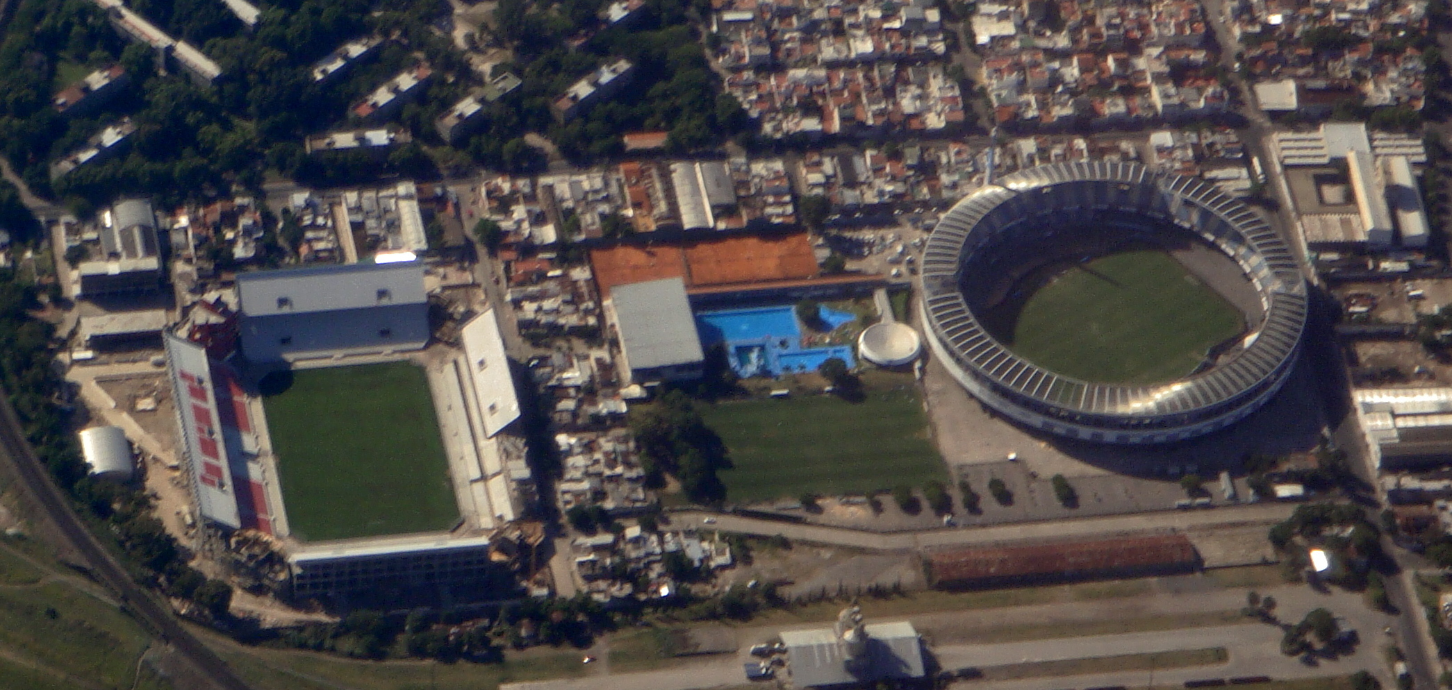 Canchas de futbol del club Independiente y Racing, a no mas de 3 cuadras de distancia.